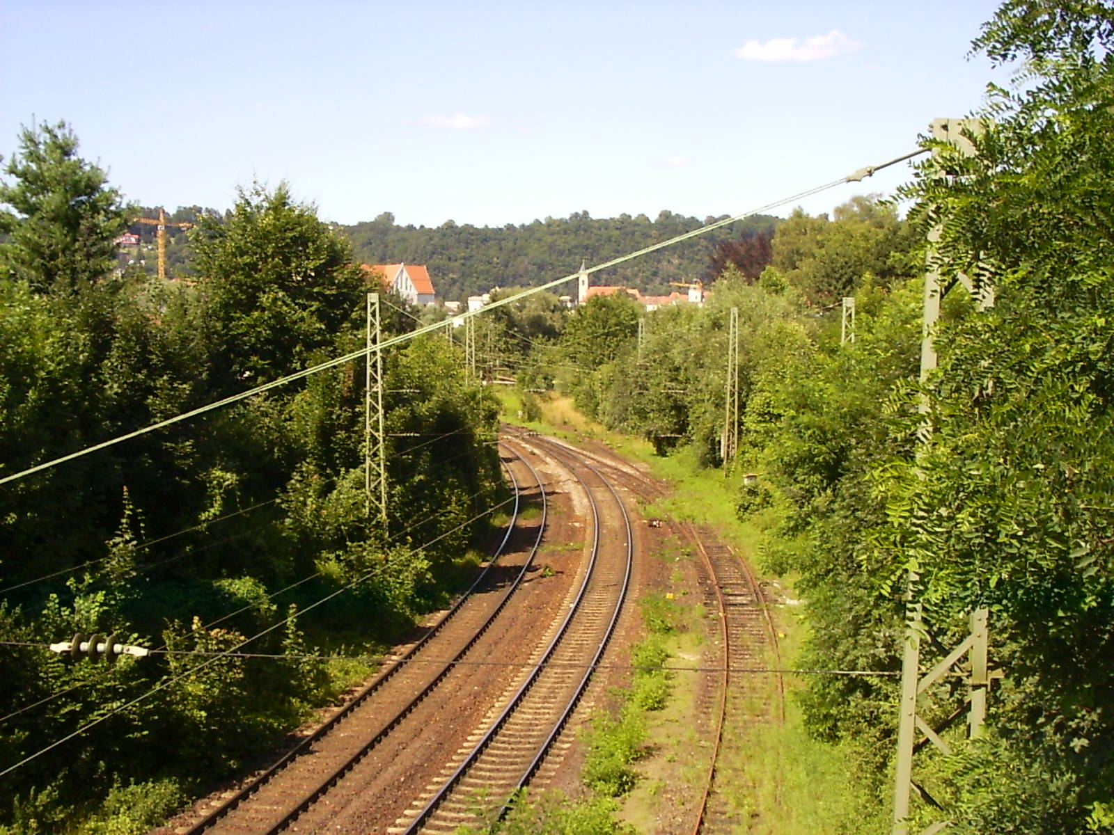 Eisenbahnabzweig am Ostufer des Inn